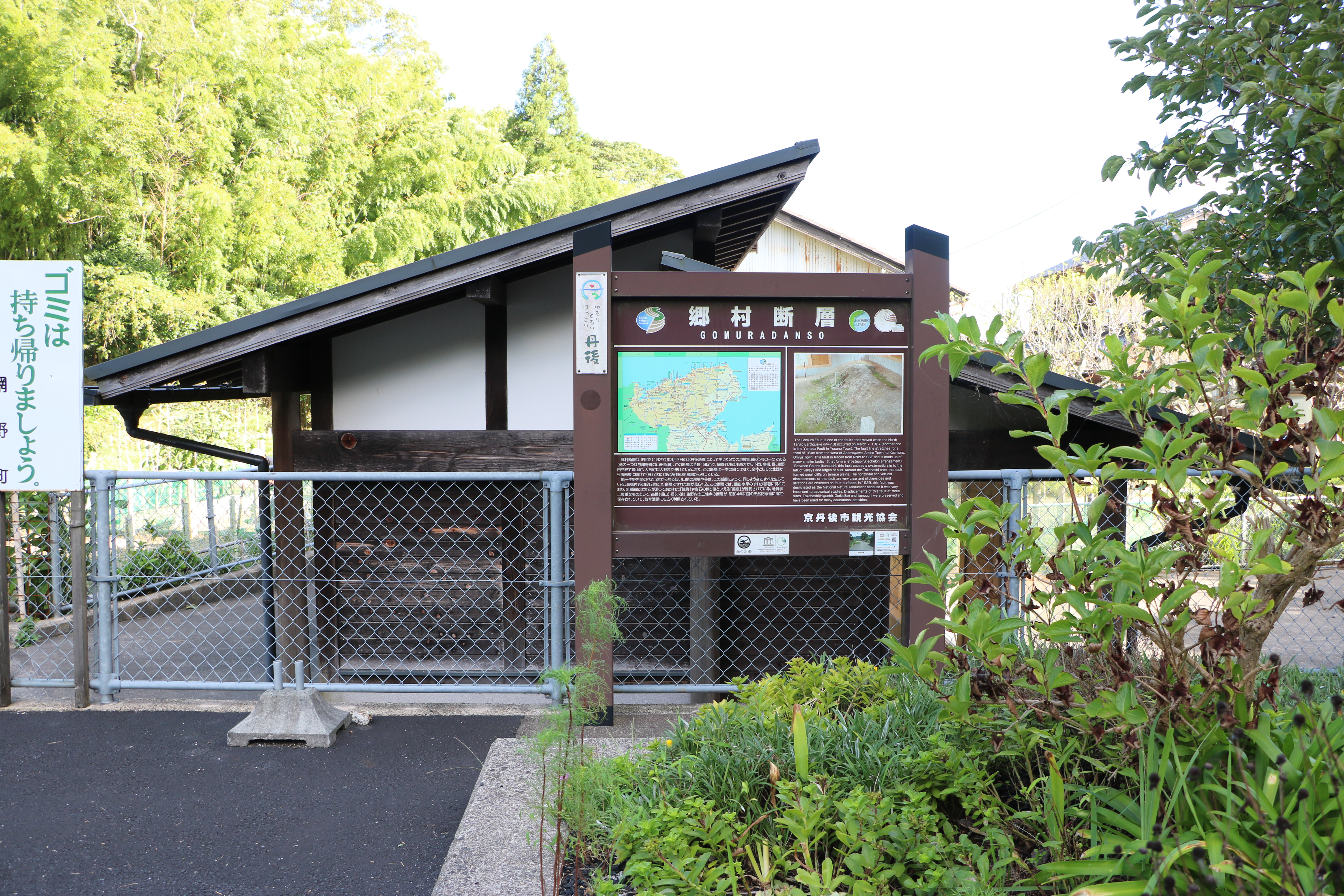 郷村断層樋口地区保存施設（国指定天然記念物、京都府京丹後市）